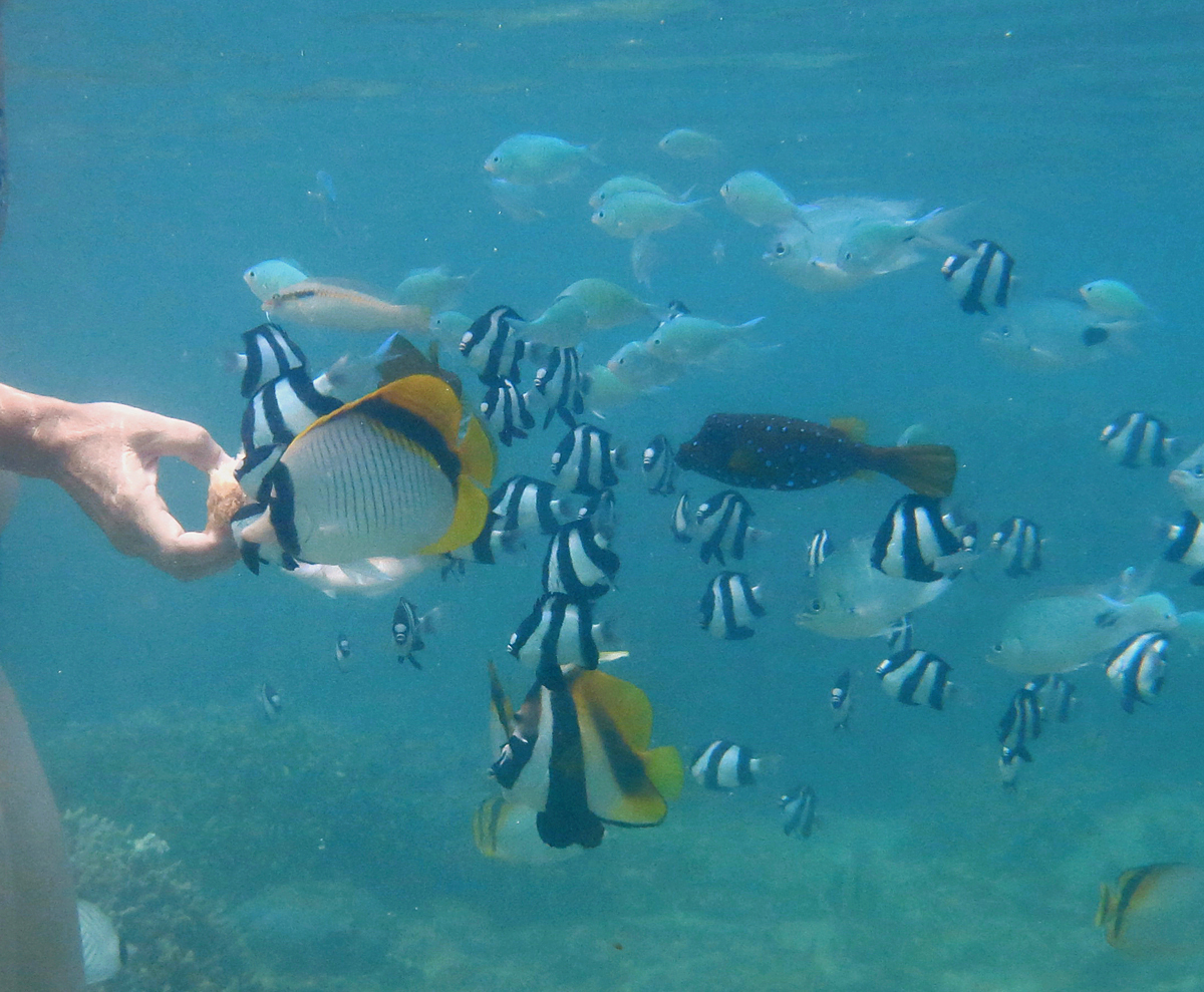 Nourrissage de poissons dans le lagon de l'Ermitage, à la Réunion. Une pratique déconseillée.